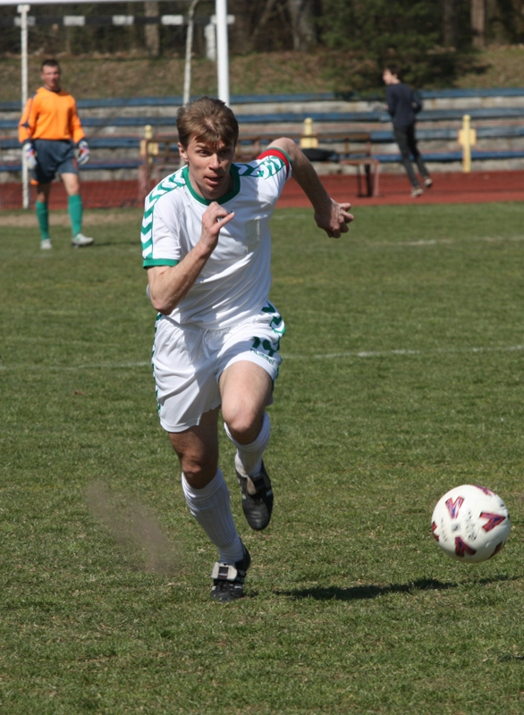 Igoris Morinas. "Žalgiris"